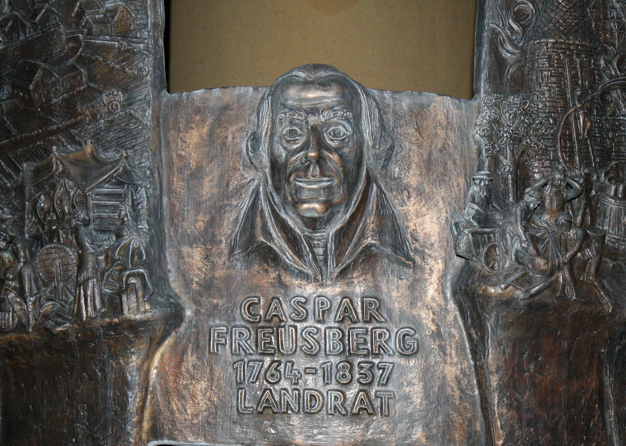 Geschichtsbrunnen am Kurkölner Platz in Olpe. Relief Caspar Freusberg.